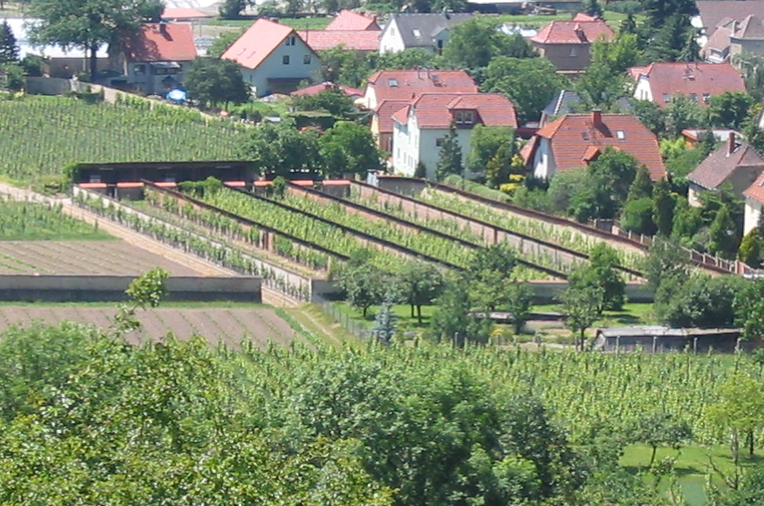 Radebeul, Talutanlage (Krapenberg) auf dem Krapenberggelände, von der Spitze des Krapenberg aus